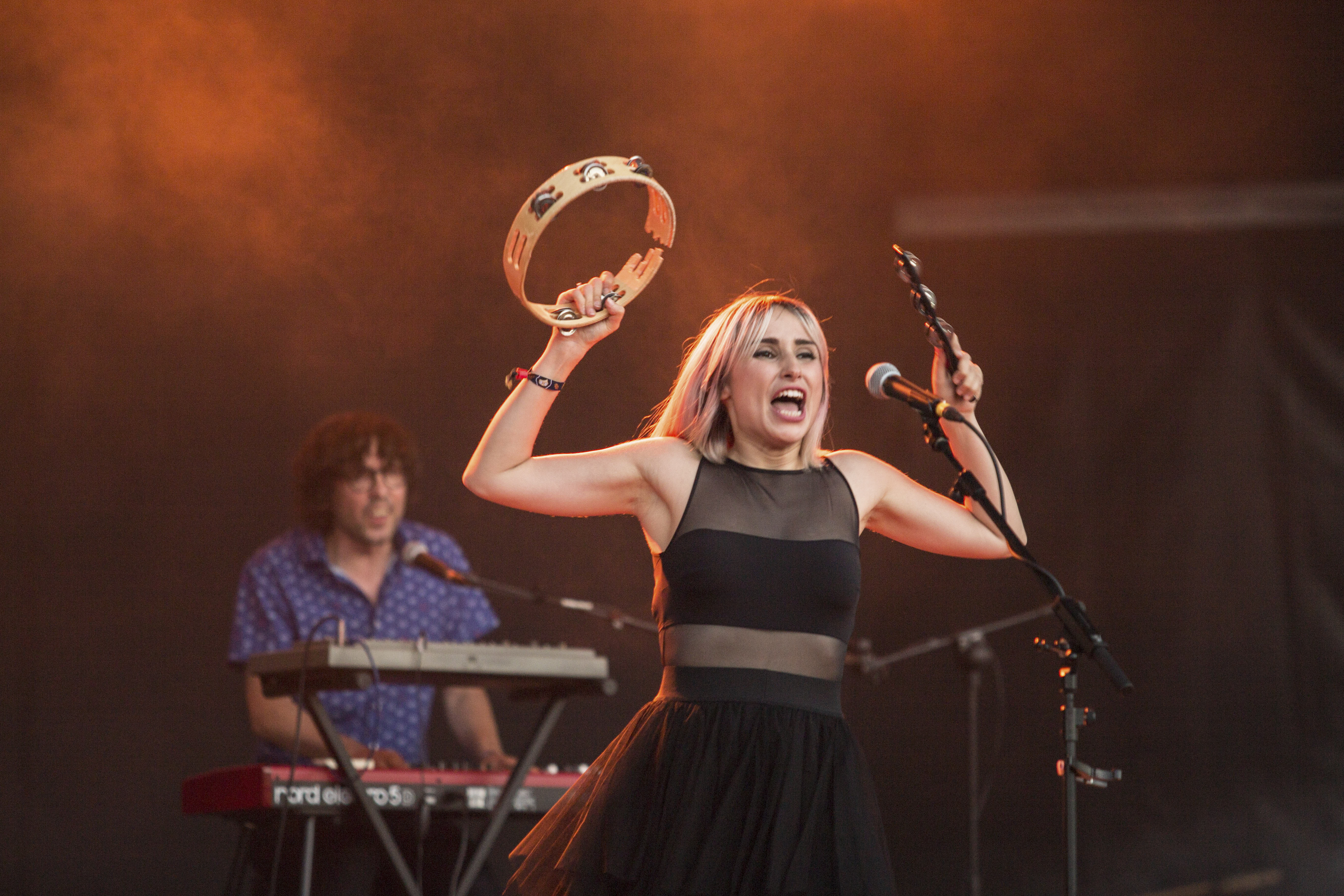 FIB 2016